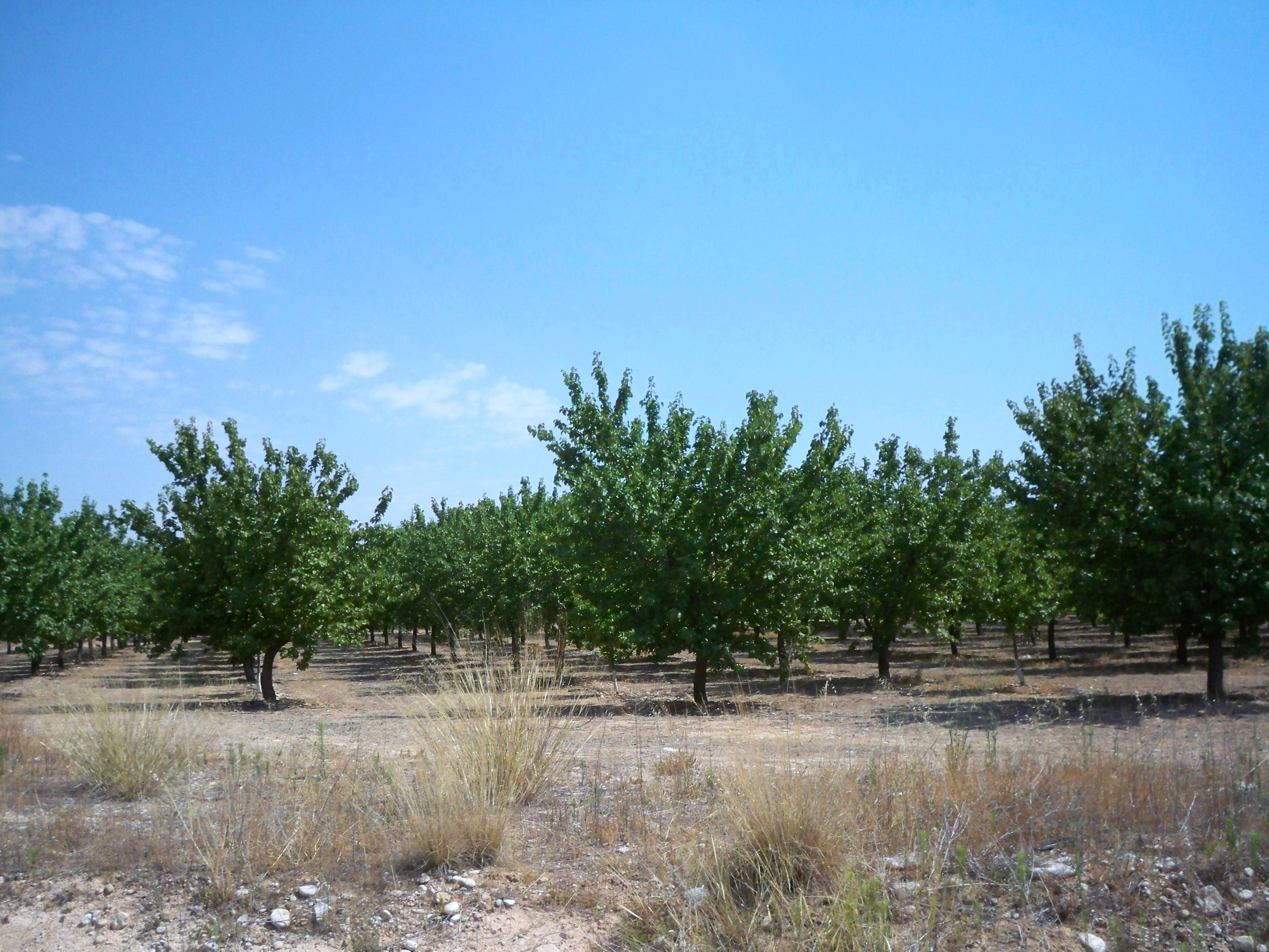 Campo de albaricoqueros en la localidad de Isso, dentro del municipio de Hellín (Albacete)